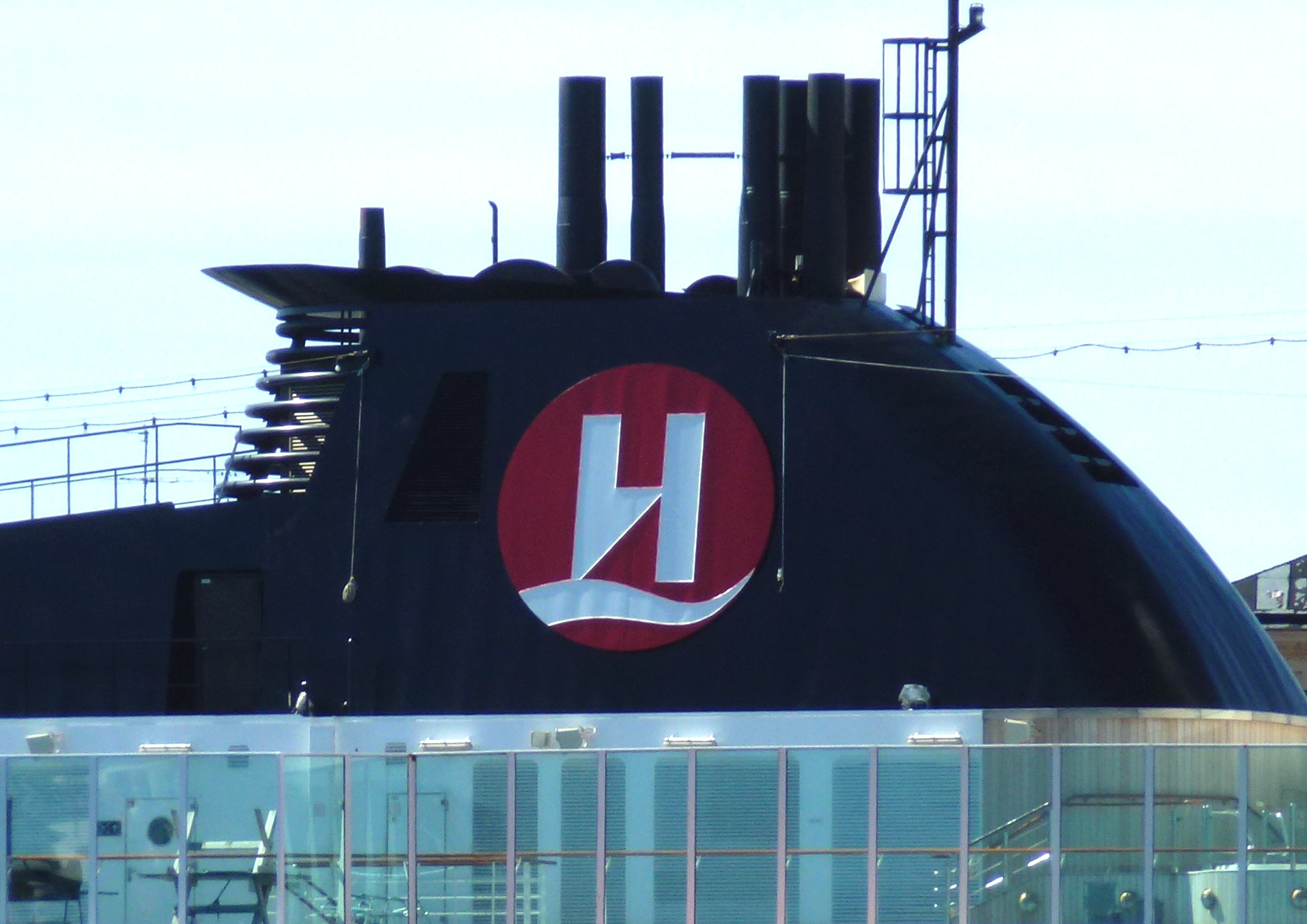 M/S Fram i Stockholm, logo på skorsten